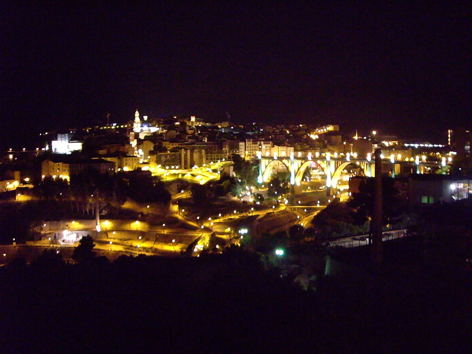 Alcoi de nit